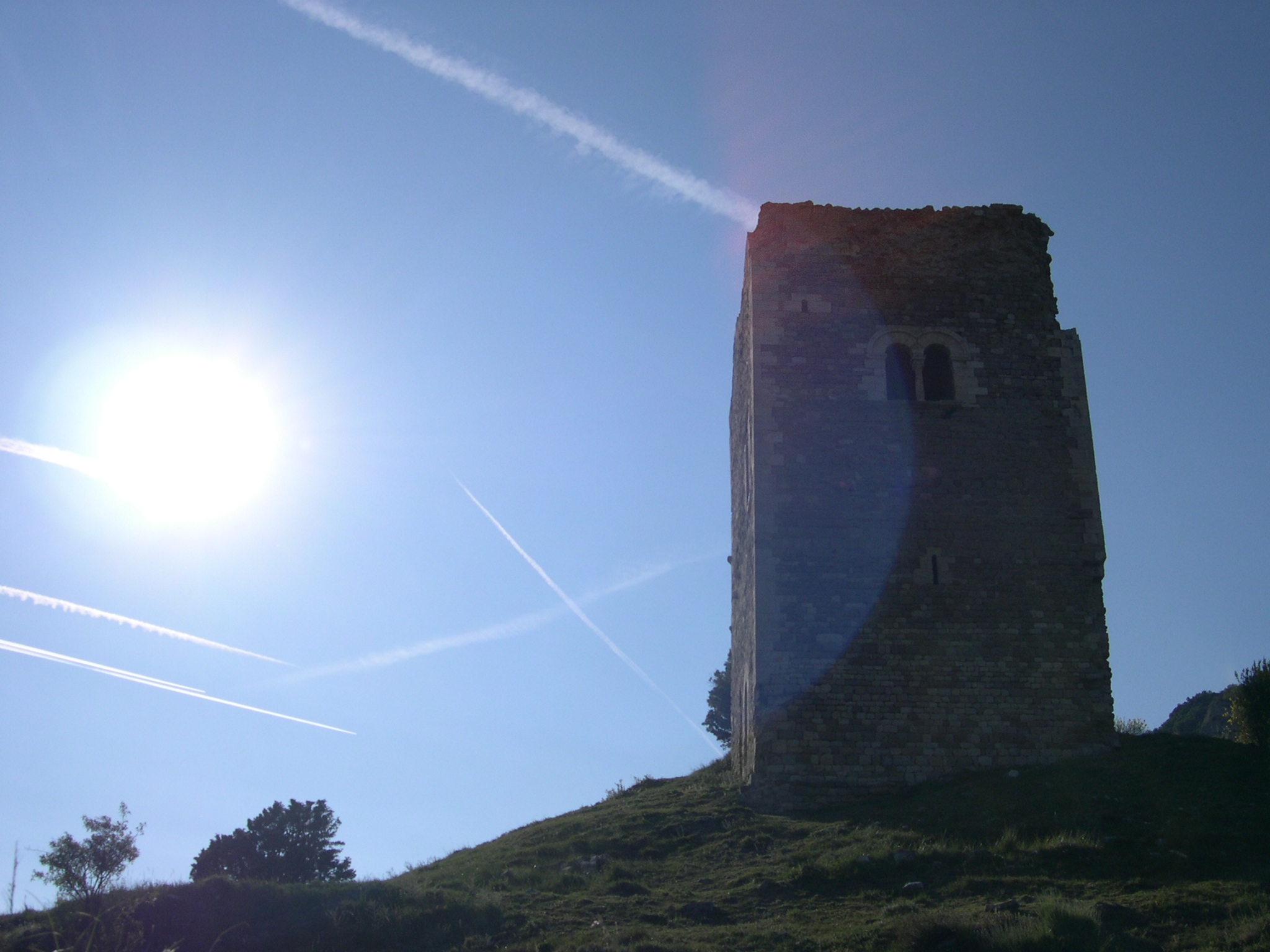 Tour d’Alançon